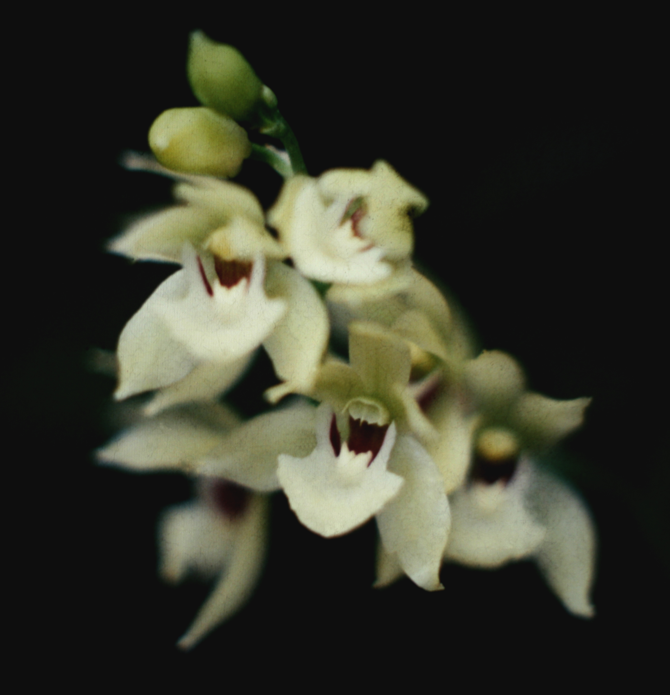 Koellensteinia carraoensis, Suriname.